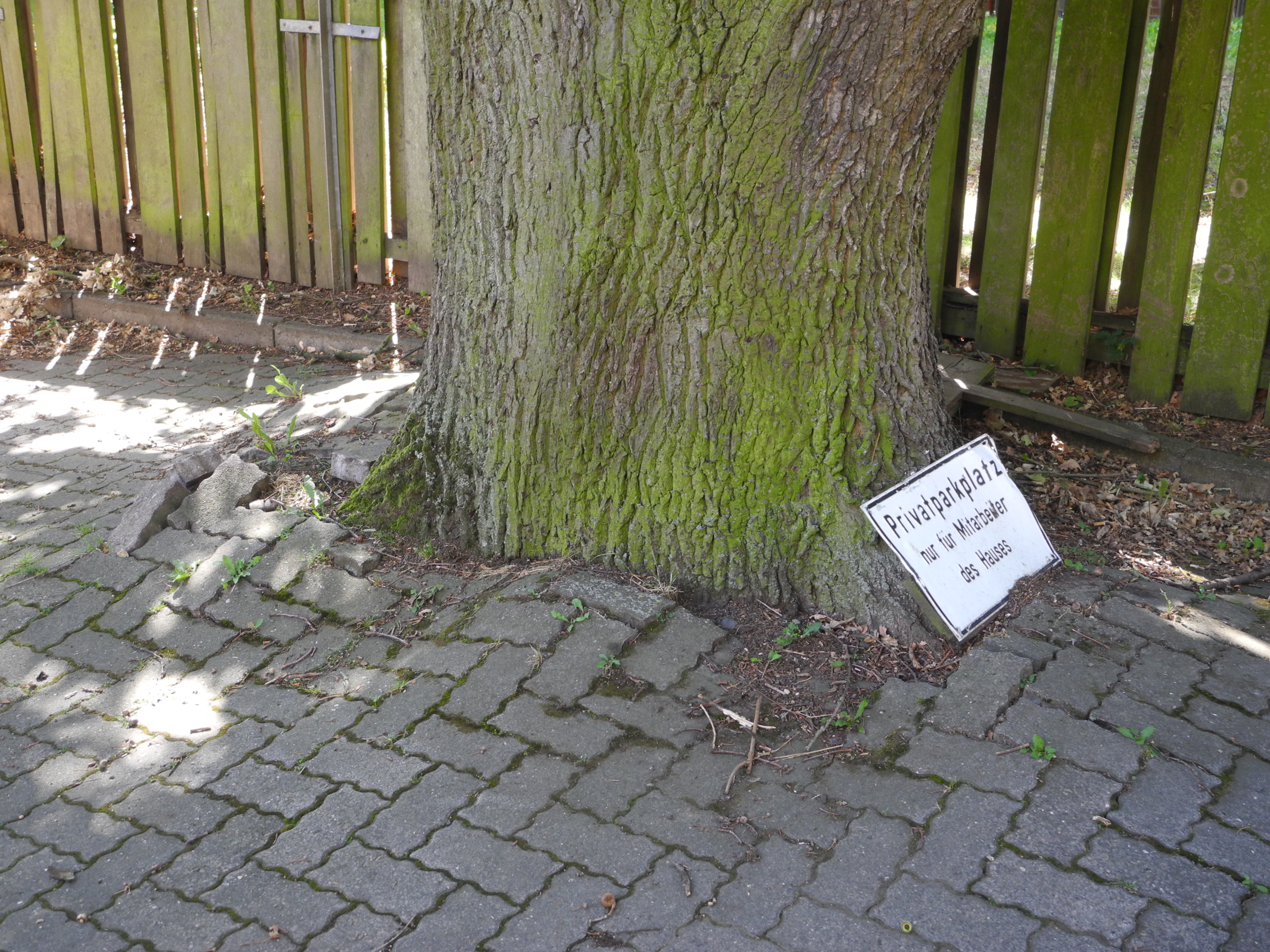 Naturdenkmal in Kassel 611.089a. "1 Pyramideneiche" (Quercus robur 'Fastigiata' ) - Landgraf-Karl-Straße, Nähe Wilhelm-Schmidt-Straße im rückwärtigen Grundstücksteil von Nr. 21.